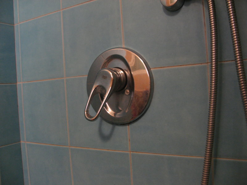 ידית של ברז אינטרפוץ